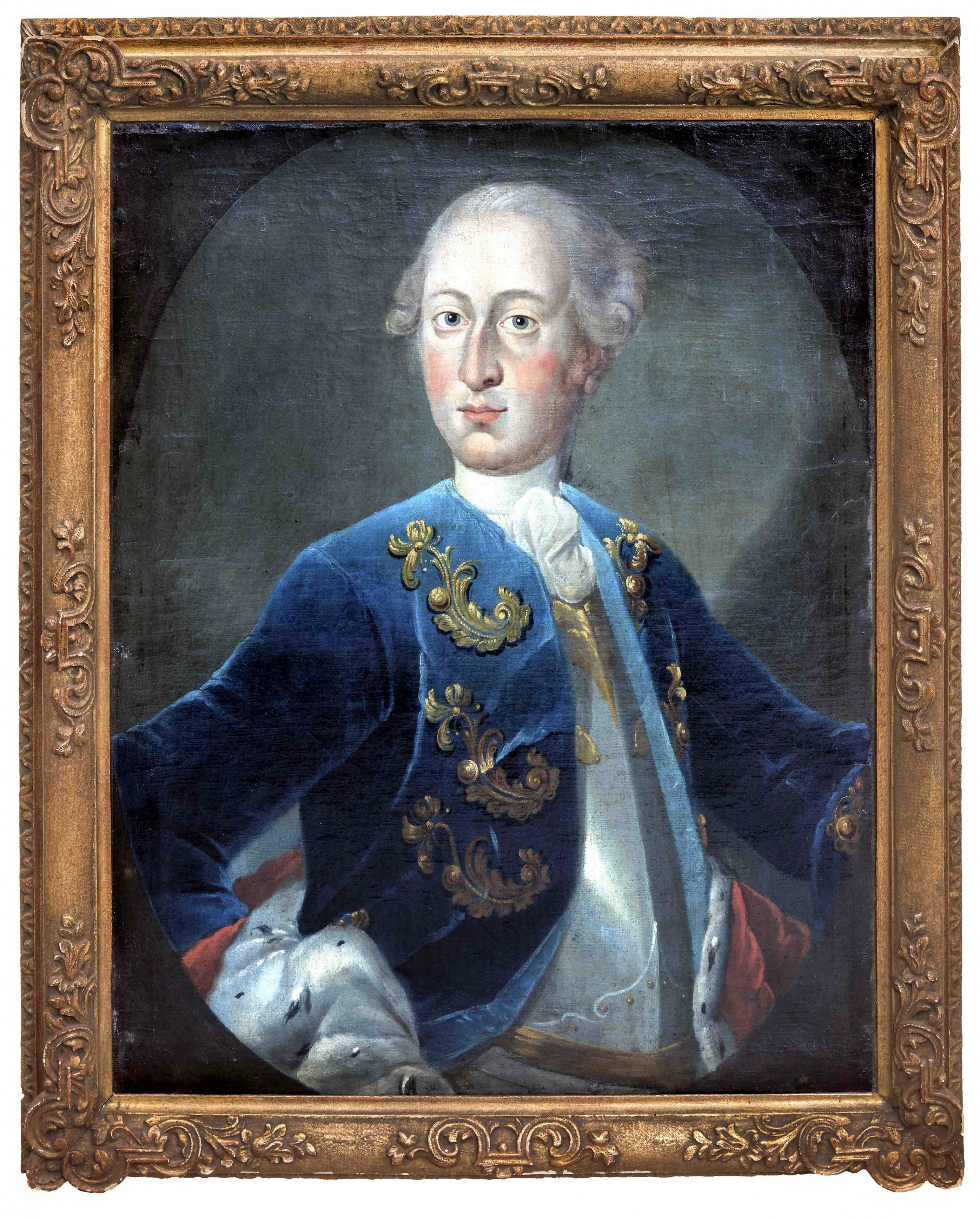 Graf Moritz Casimir II. von Bentheim-Tecklenburg, Öl auf Leinwand, unbekannter Künstler, ca. 1765. – Graf Moritz Casimir II. wurde 1735 auf Schloss Hohenlimburg geboren und starb 1805 in Rheda. Seine Eltern waren Graf Moritz Casimir I. von Bentheim-Tecklenburg (1701-1768) und dessen Ehefrau Albertine Henriette von Ysenburg-Meerholz (1703-1749). Er studierte in Utrecht und heiratete 1761 die Gräfin Charlotte Sophie zu Sayn-Wittgenstein (1739-1805). Nach dem Tod seines Vaters 1768 regierte Moritz Casimir II. die Grafschaft Limburg und die Herrschaft Rheda. Ab 1756 war Schloss Rheda Hauptresidenz und Regierungssitz des Grafenhauses. – Herkunft/Rechte: Stadtmuseum Hagen / Heike Wippermann (RR-R).